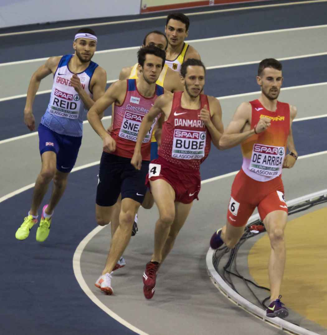 EKI20303 semi 800m bube de arriba